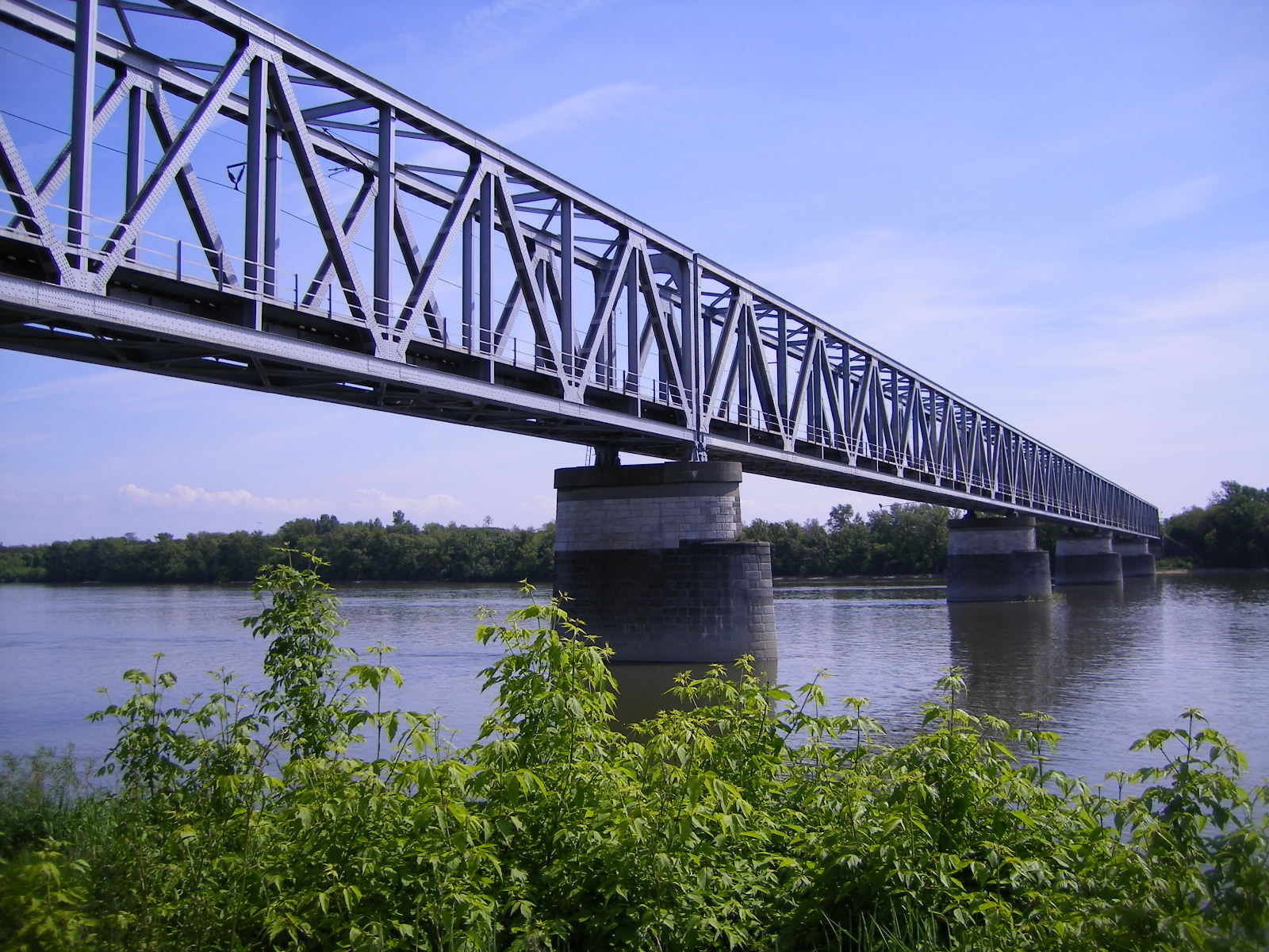 Komárom - vasúti Duna-híd